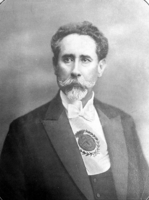 José Néstor Lencinas